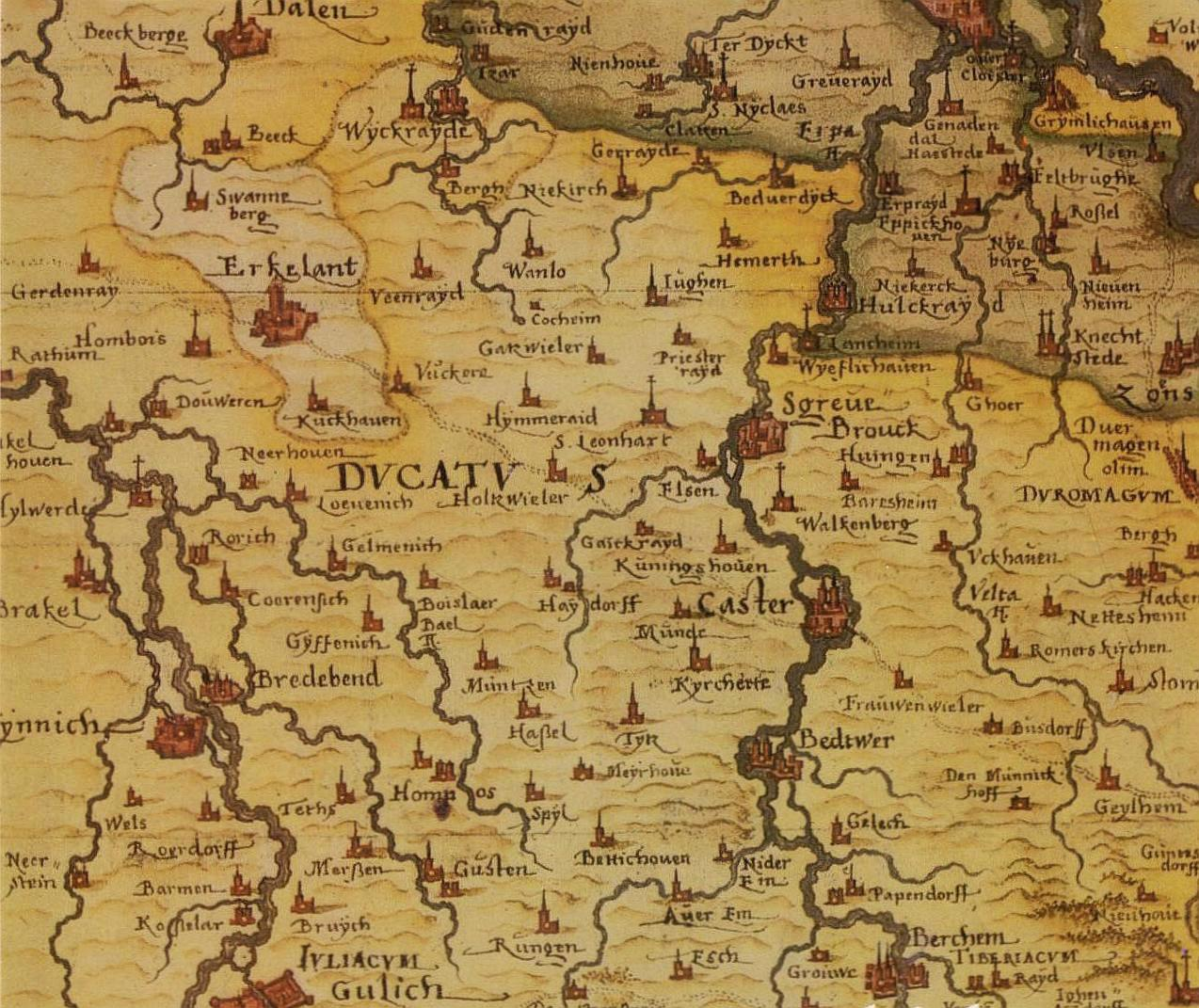 Detail from Christian Sgrothen`s Atlas, 1557. Showing Towns and villages of the german Lower Rheinland between Rhine, Erft and Rur: Jülich, Linnich, Erkelenz, Zons, Dormagen, Kaster, Bergheim...